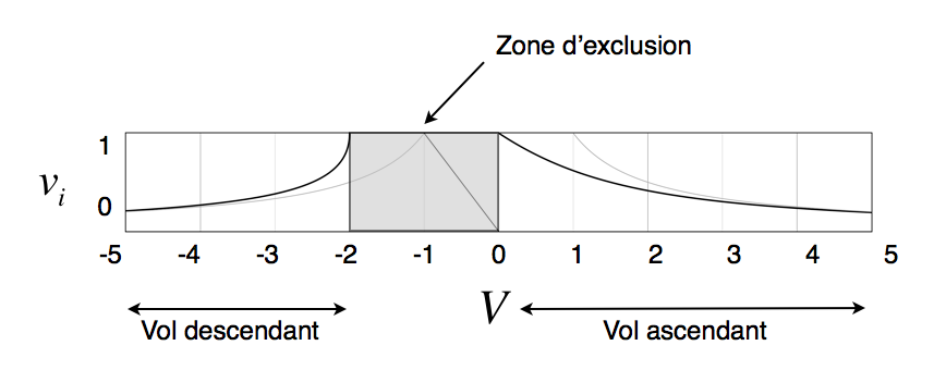 Relation vitesse/vitesse induite en vol ascendant/descendant